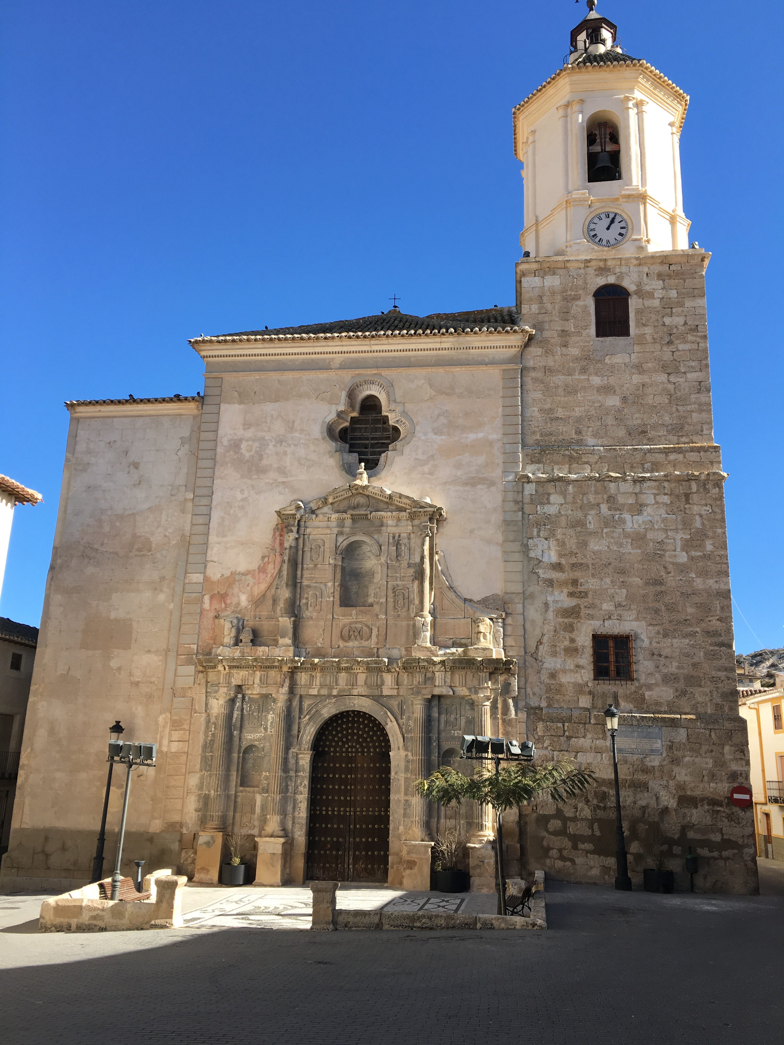 Orce